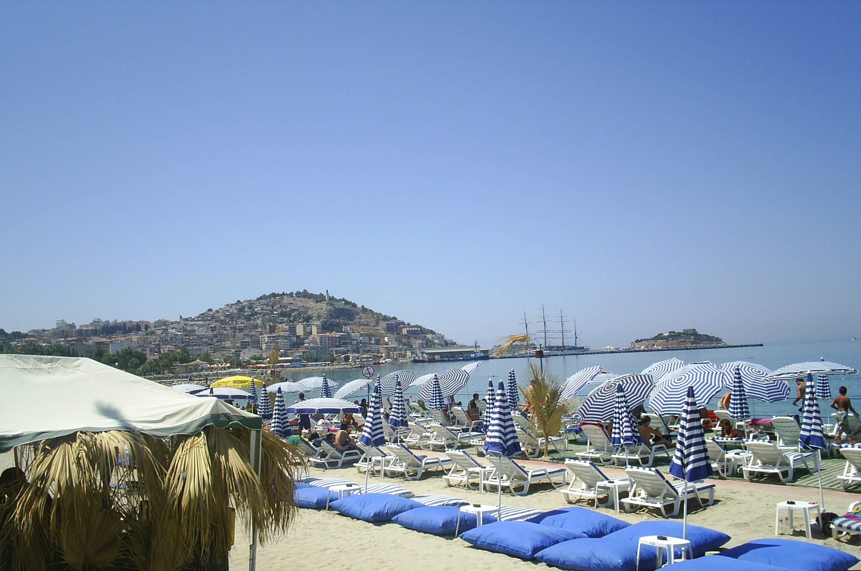 Kuşadası merkezindeki plaj